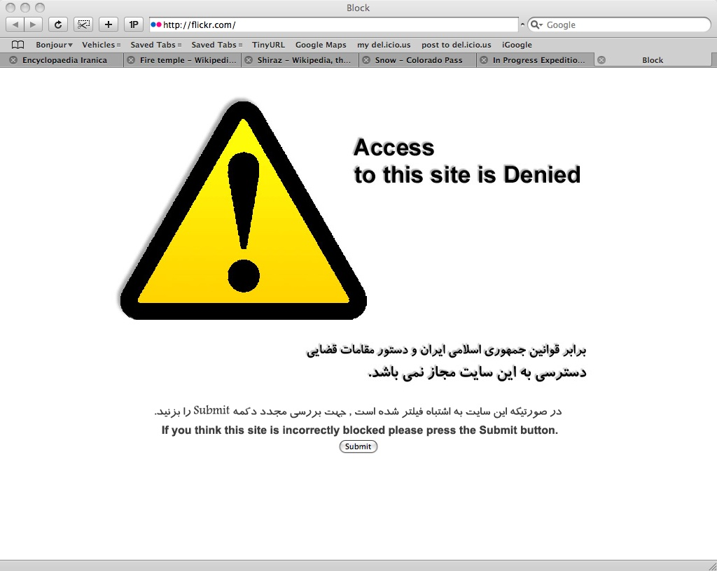 flickrblocked